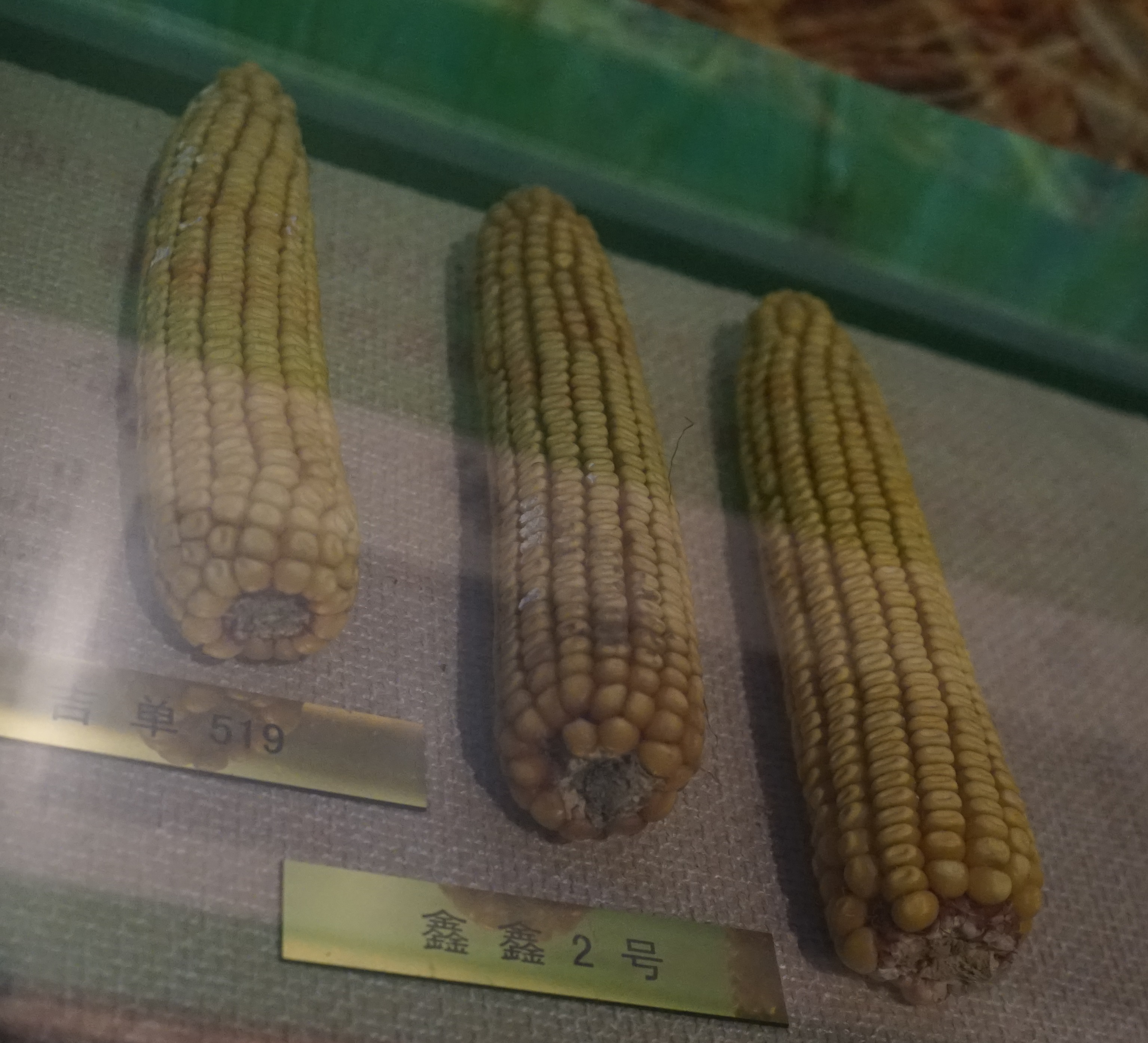 中文（中国大陆）: 从左到右：吉单519、鑫鑫2号、绥玉15